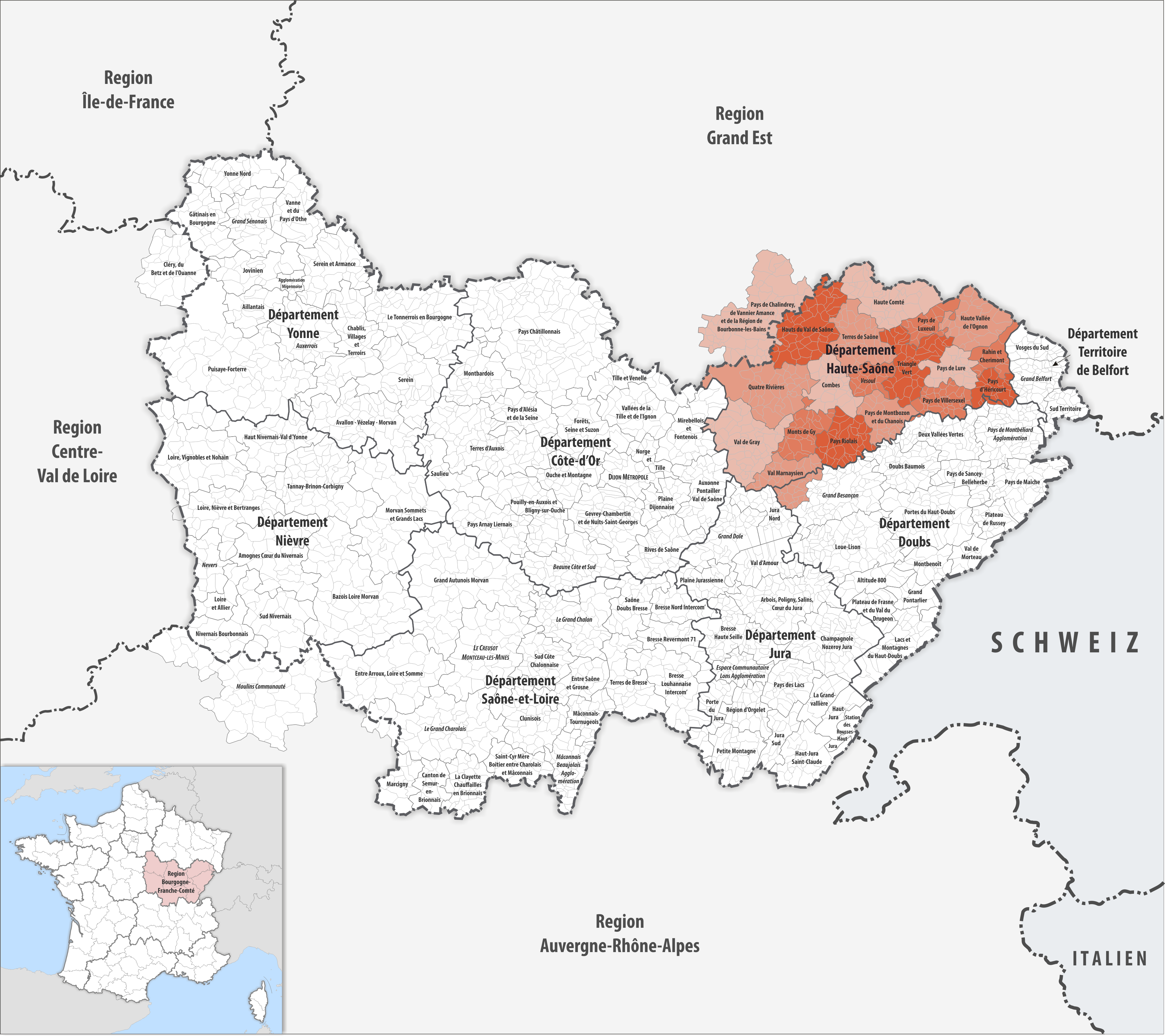 Lage des Gemeindeverbandes Haute-Saône